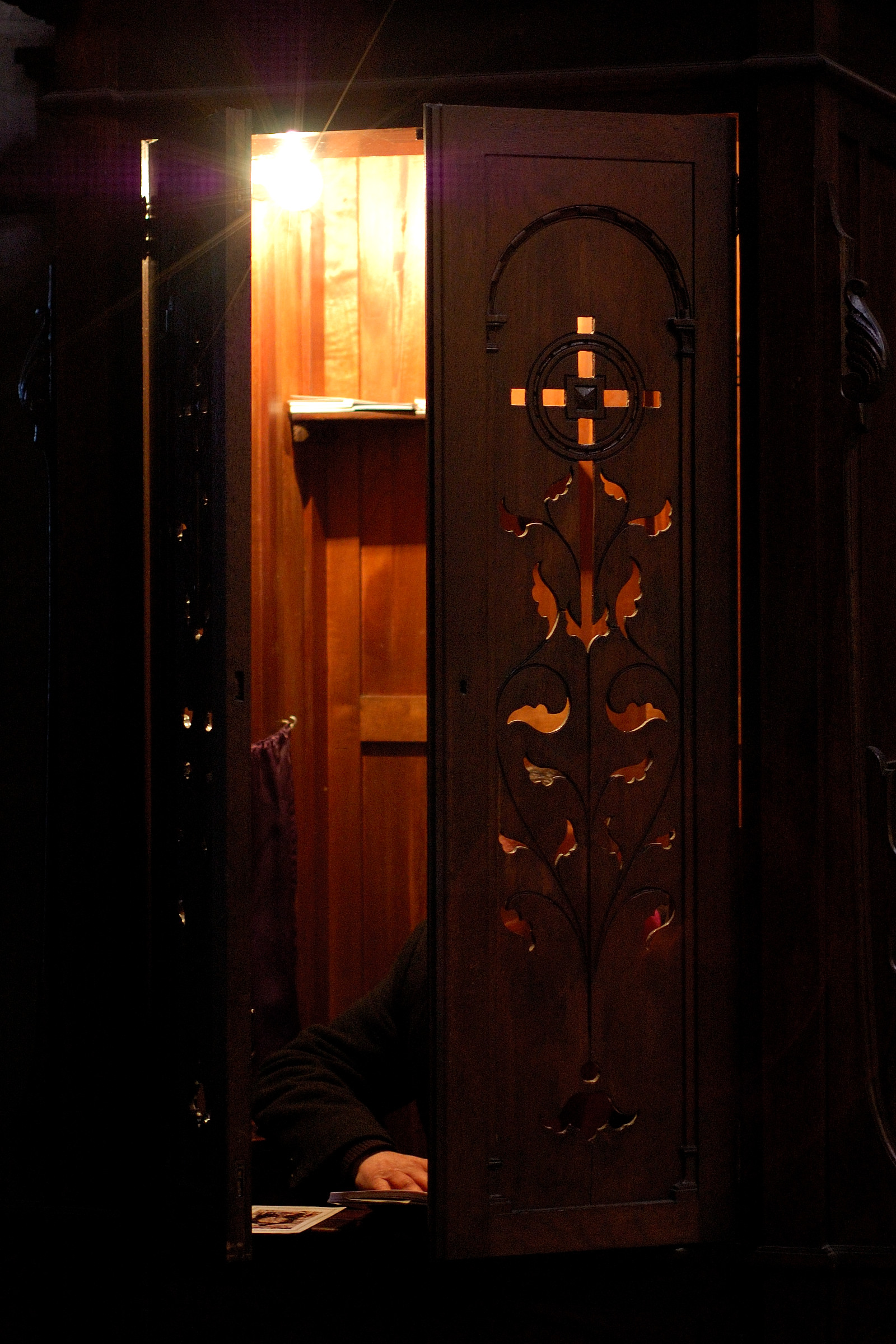 Catedral de Lugo, Galicia, Spain [2006]